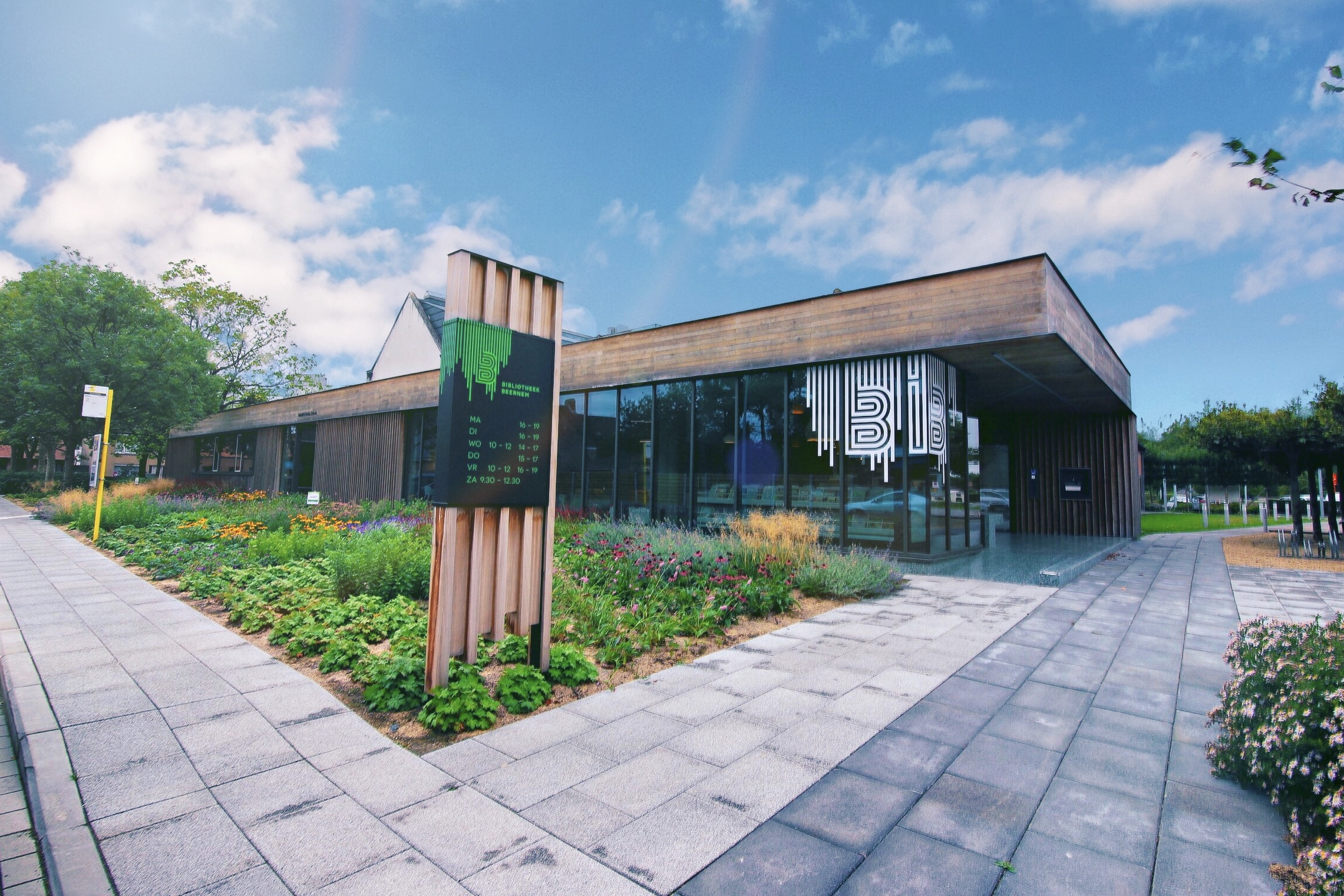 De, in 2019 gerenoveerde, bibliotheek in Beernem. Deze foto is genomen op 11/09/2019.